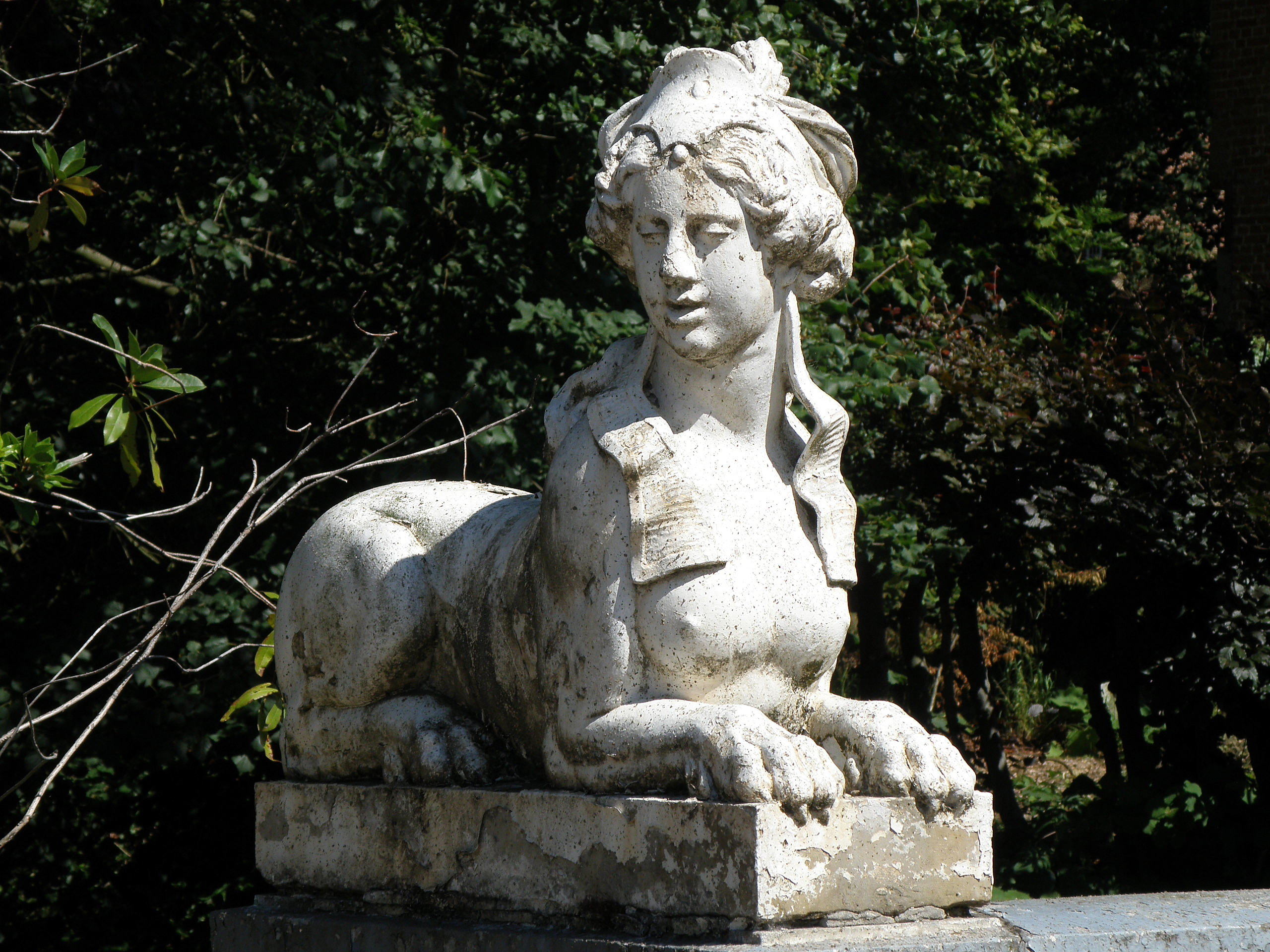 Edegem (prov. Antwerpen, België). Hof ter Linden.